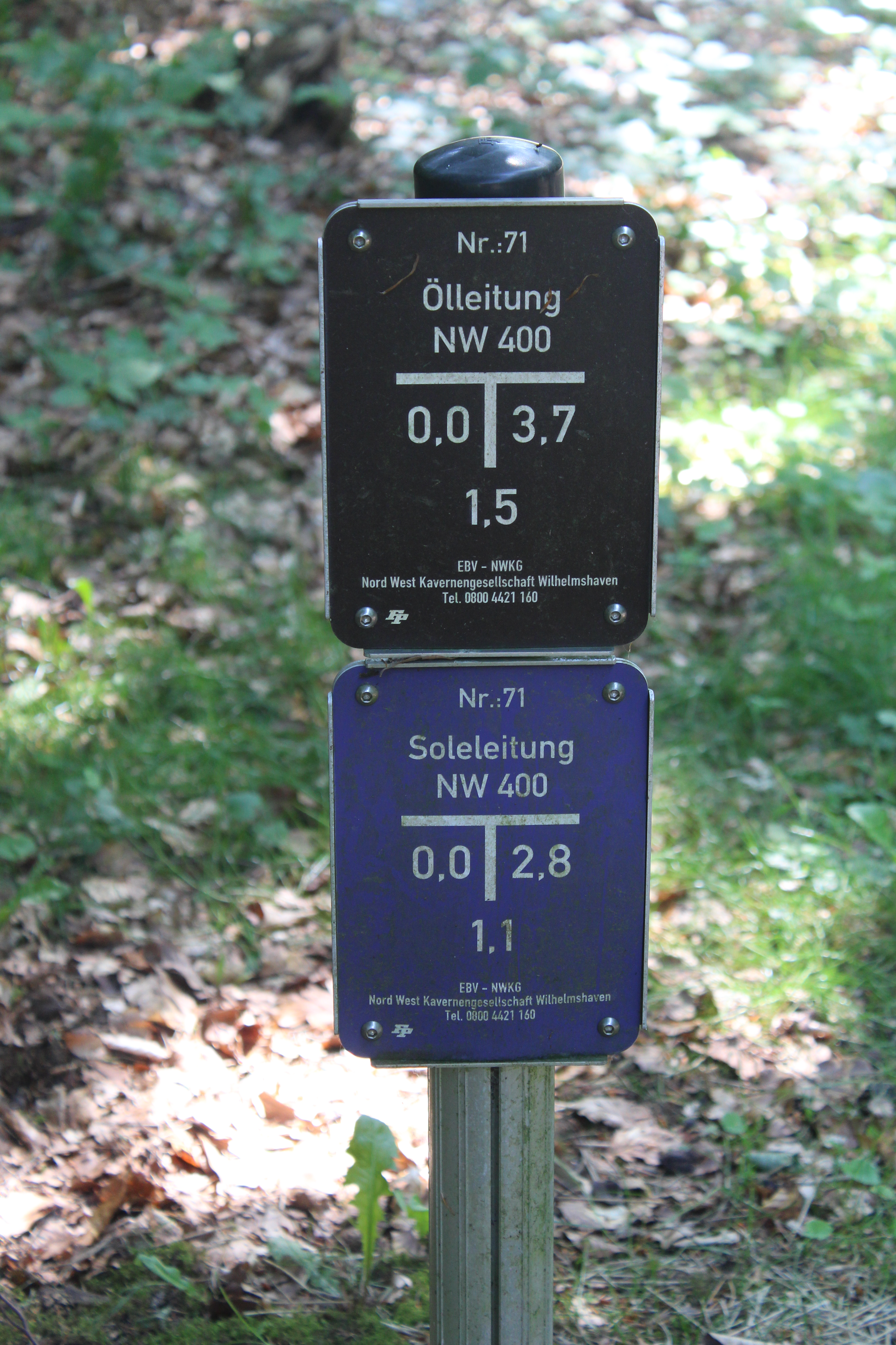 Schilder an der Stadtscheide, Hamburg-Heimfeld, Schwarze Berge. Die Schilder kennzeichnen den Verlauf der Rohrleitungen zwischen einer Hamburger Raffinerie und dem Kavernenspeicher Sottorf (Öl und Sole).